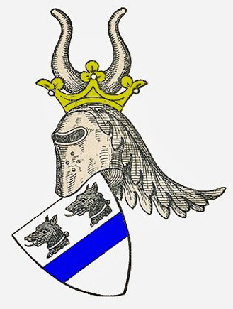 Wappen der Familie von Gadendorp (Gadendorf), erloschen Mitte des 16. Jahrhunderts.